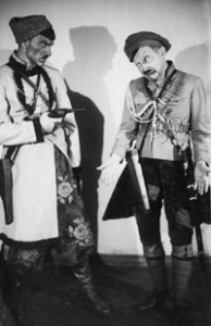 Сцена из премьеры оперетты "Свадьба в Малиновке" в Московском театре оперетты